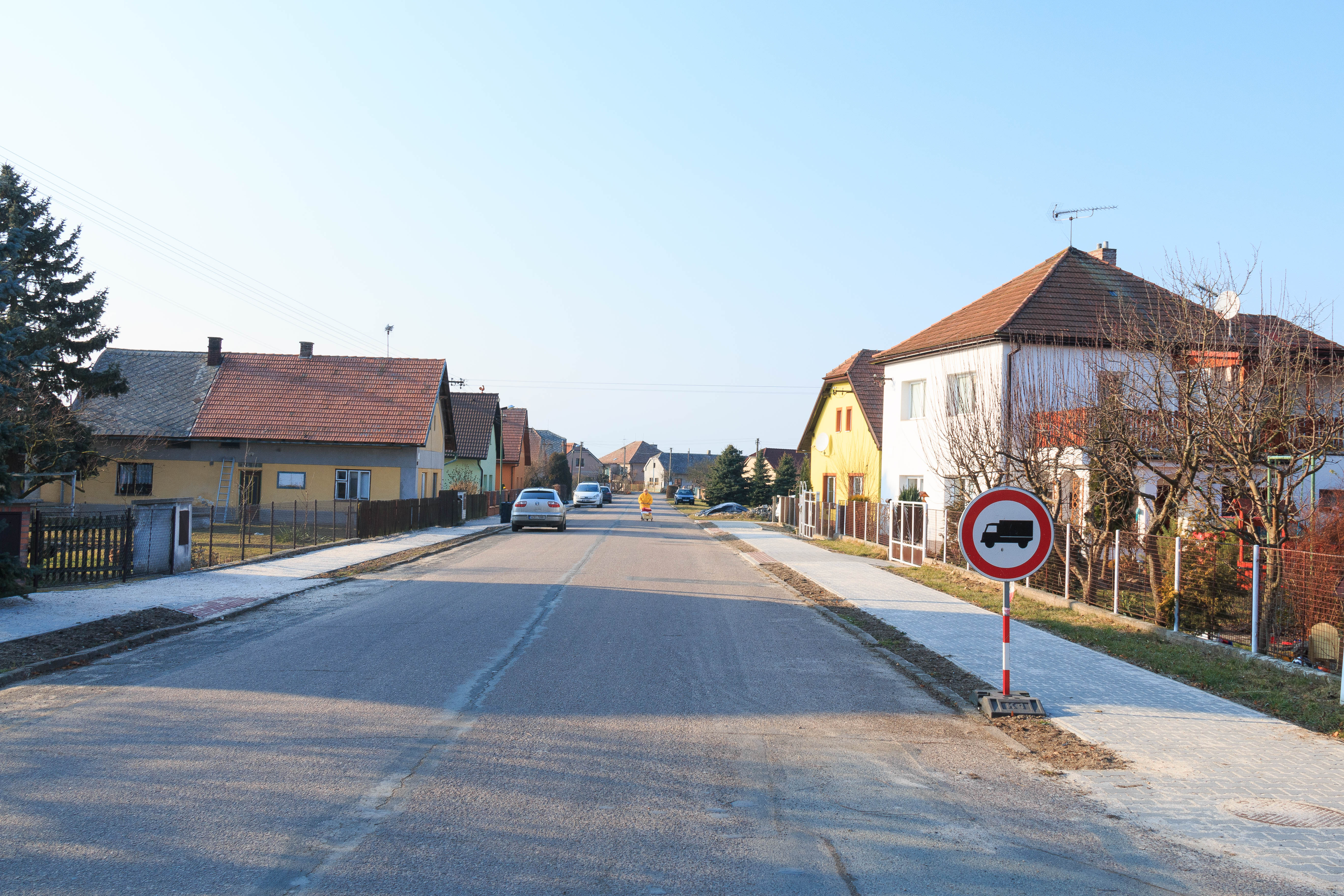 Vlčí Habřina čp. 102